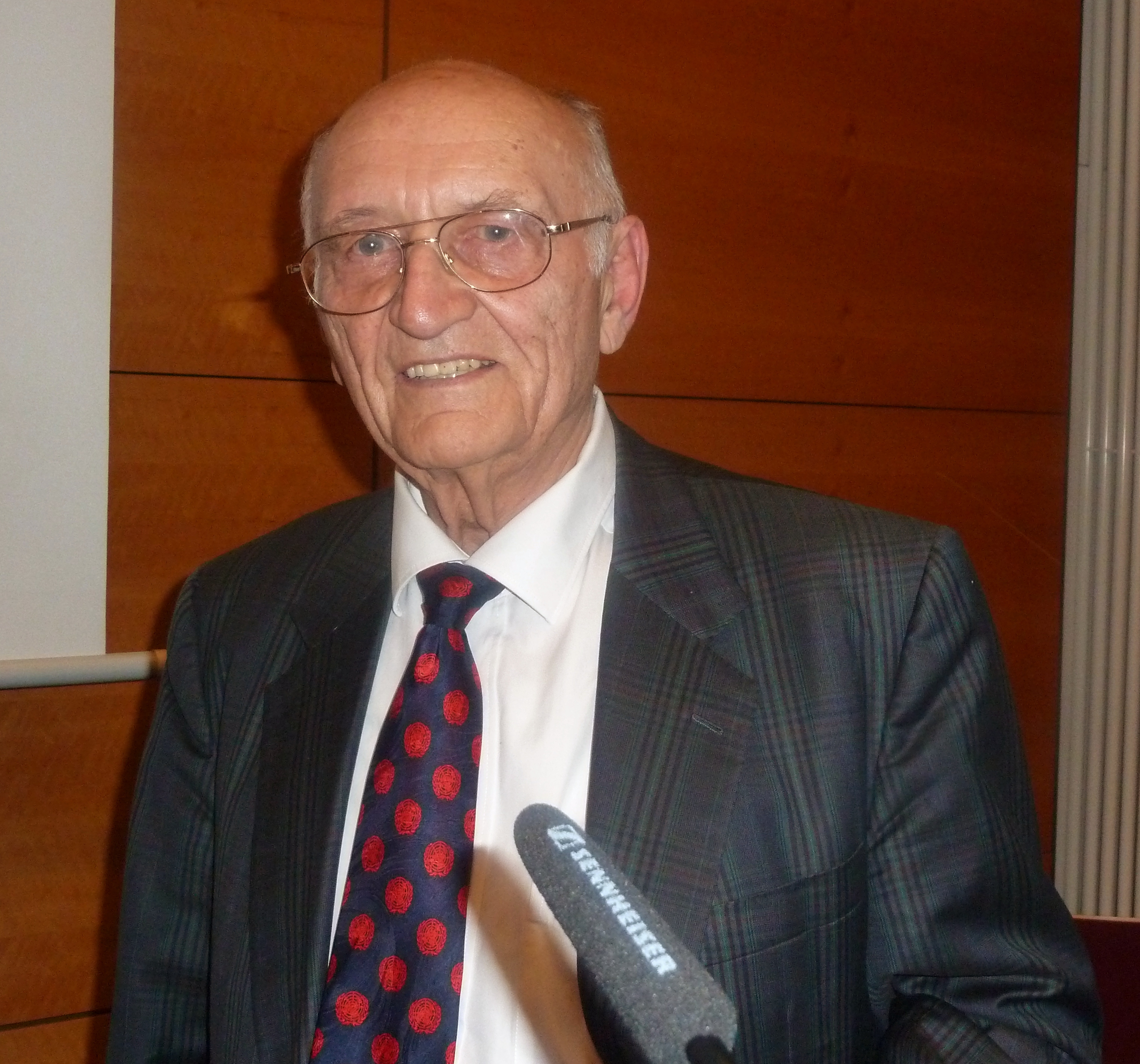 Gynäkologe und Perinatalmediziner Prof. Dr. Erich Saling während eines Vortrags im Klinikum Links der Weser in Bremen